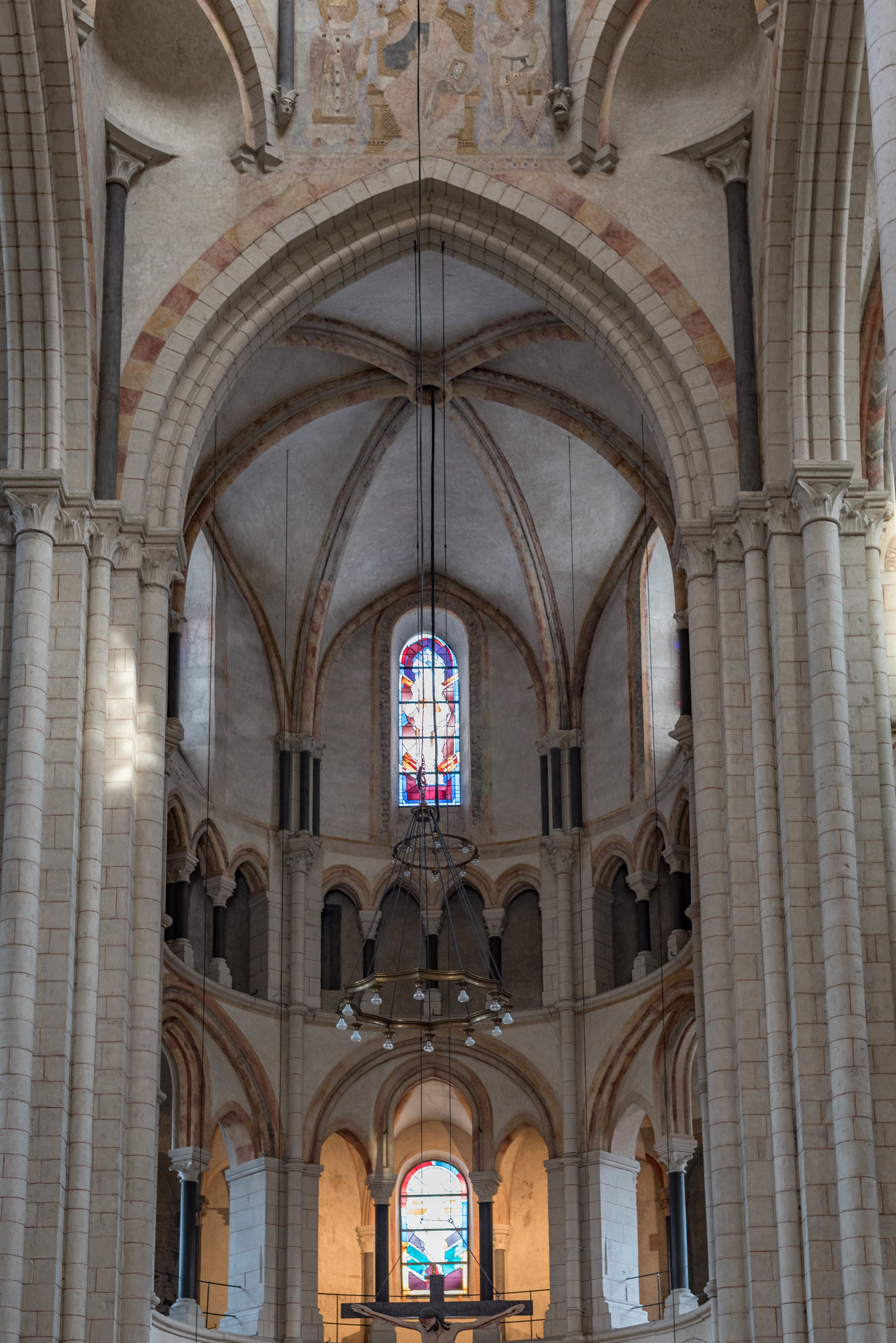 Limburg an der Lahn, Dom, Innen, Blick nach Osten Richtung Chor